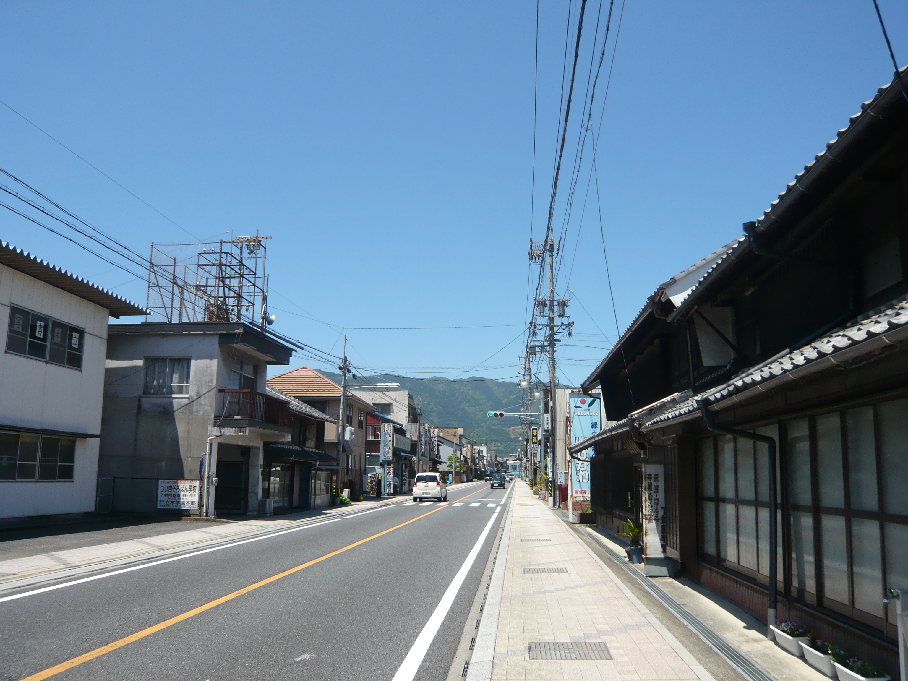 揖斐町中心部（新道沿い）